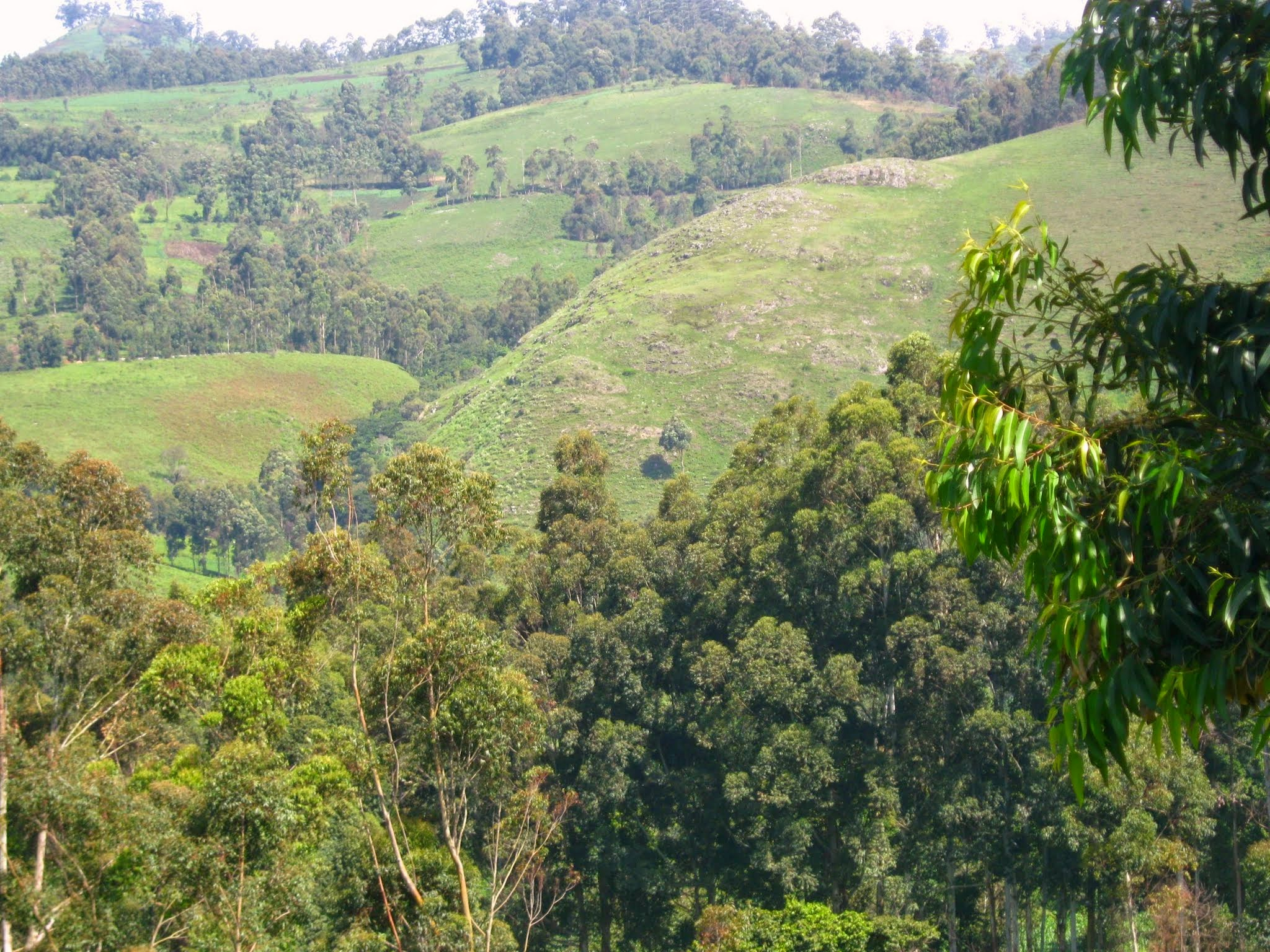 Bangang, le village des montagnards